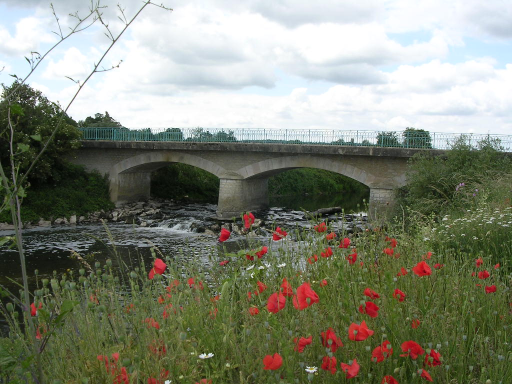 Pont sur la rivière Ouche (Côte-d'Or) à Tart l'Abbaye